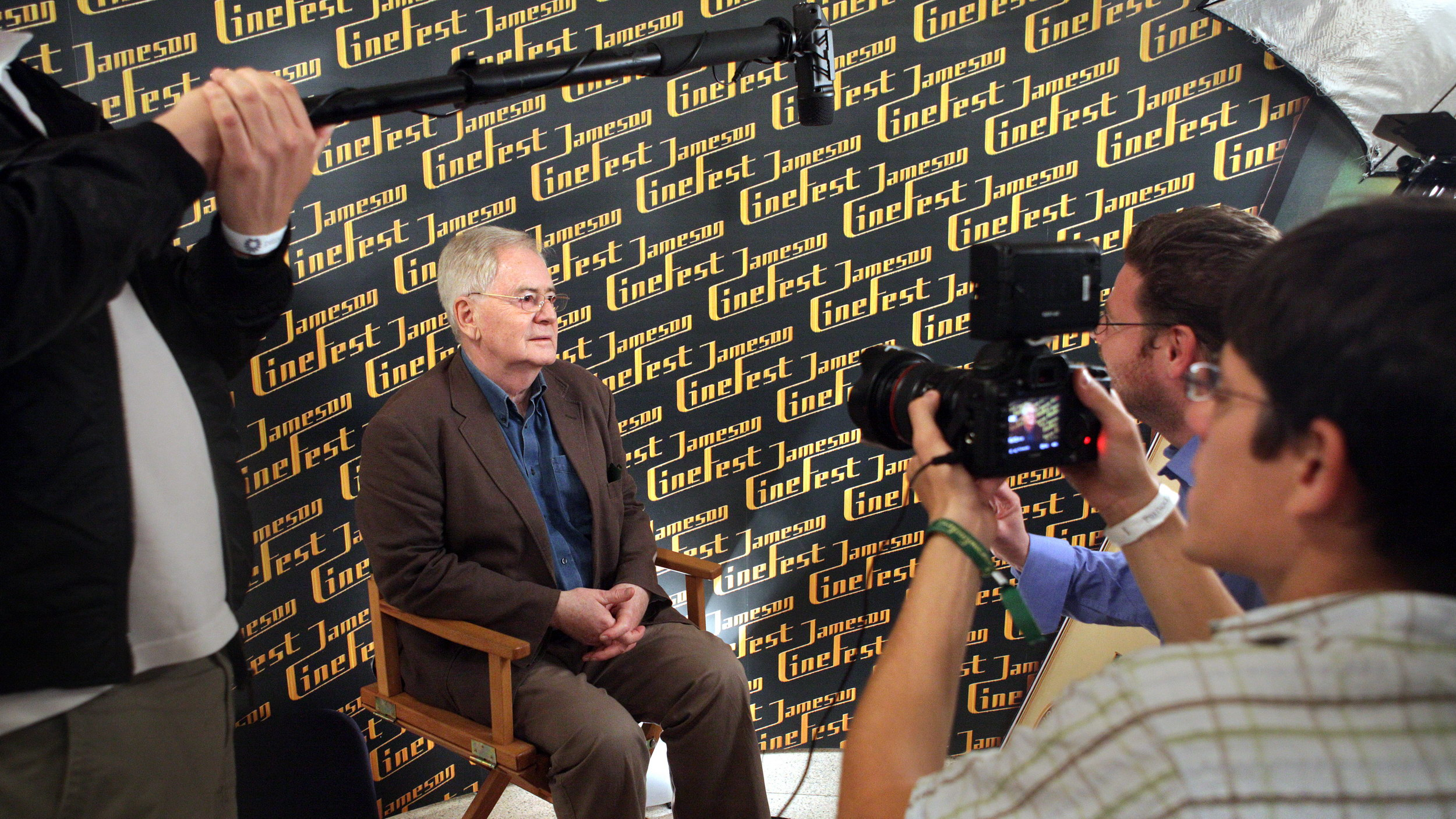 Szabó István interjút ad a CineFest fesztiválon (Miskolci Nemzetközi Filmfesztivál)